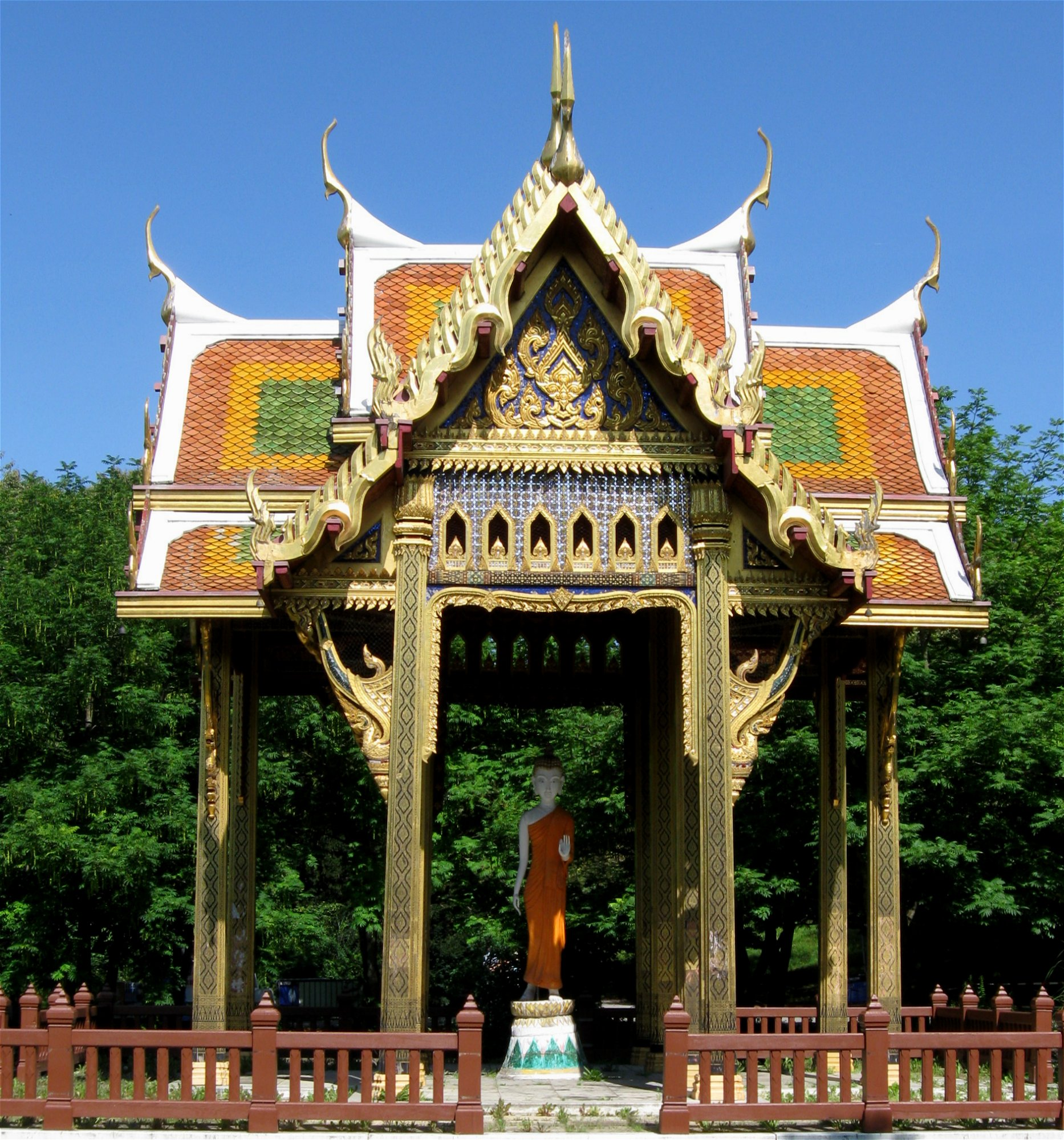 Thailändische Sala im Westpark, München